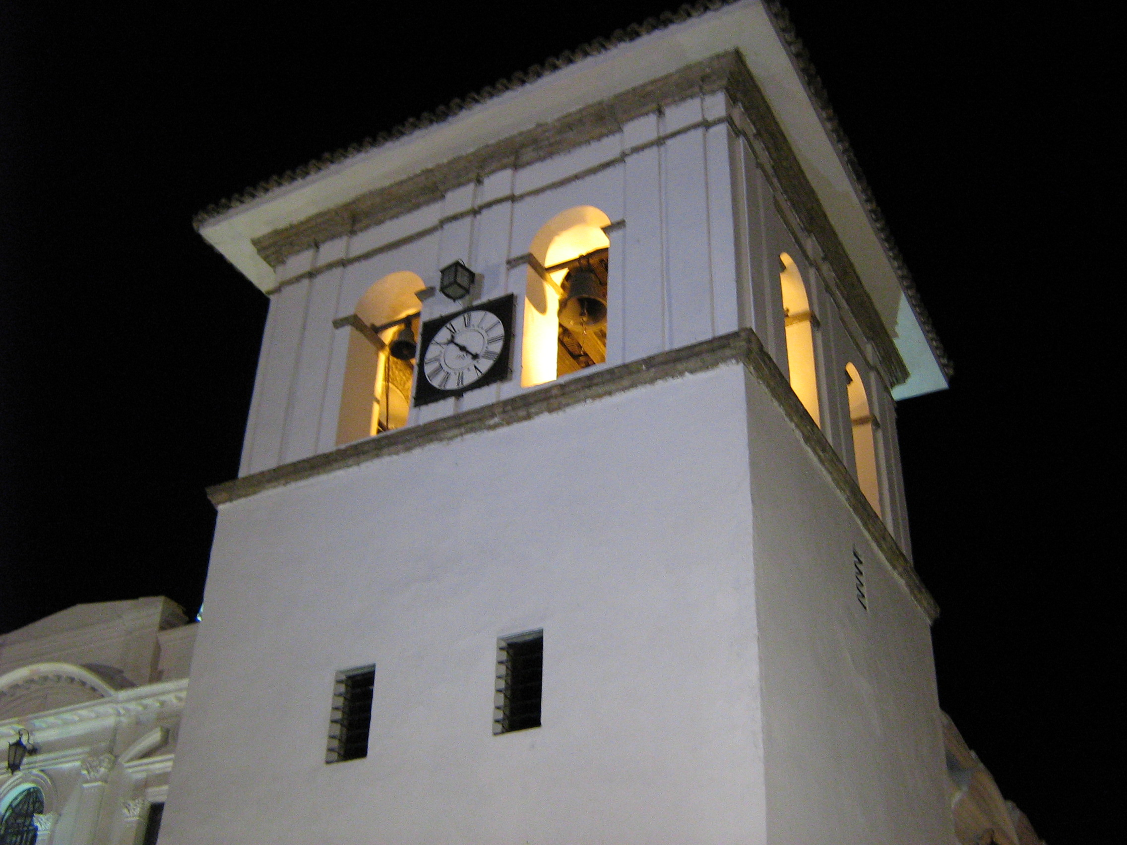 Torre del Reloj en Popayán-Colombia